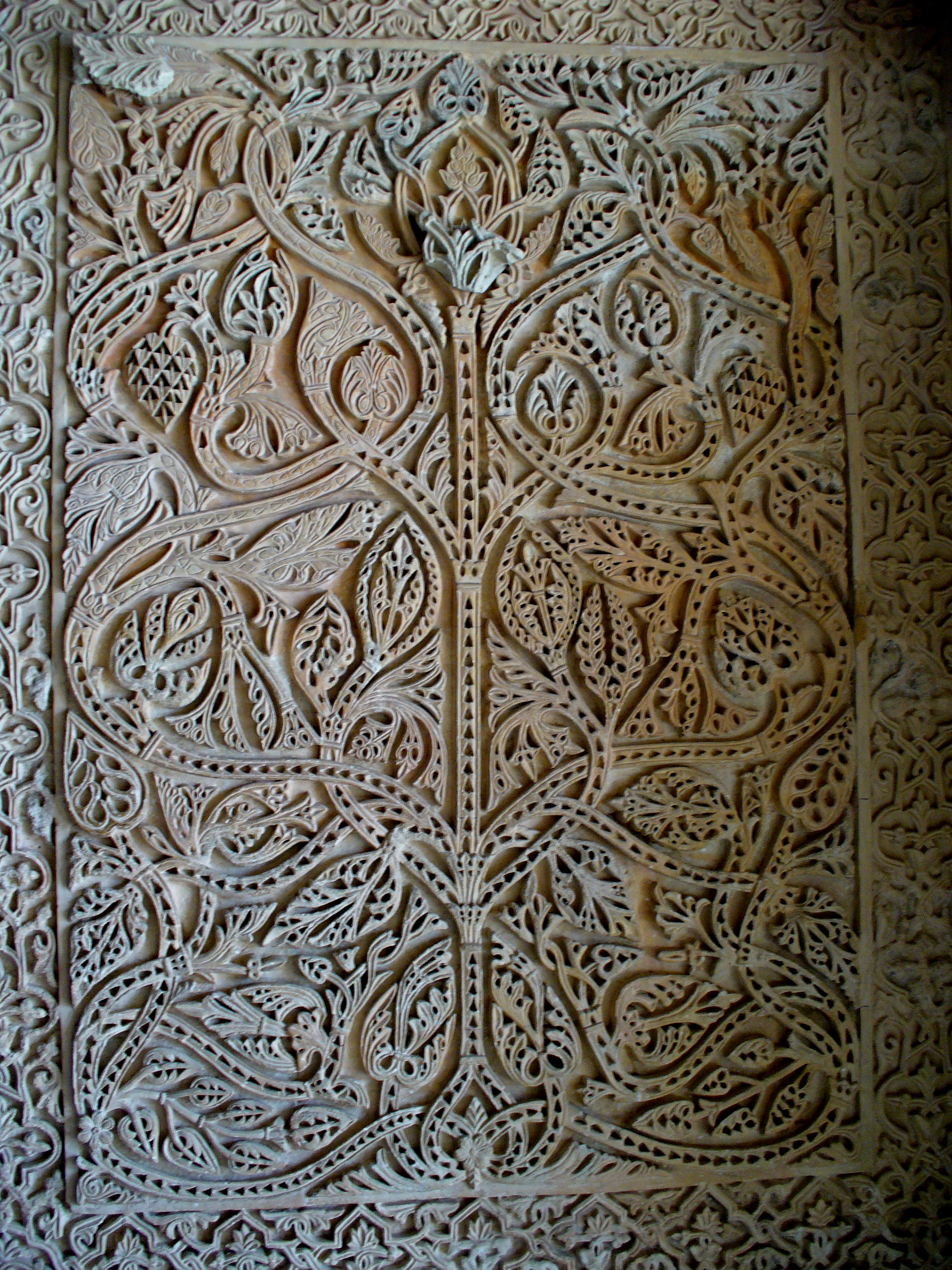 Decoración de Medina Azahara en Córdoba, España.